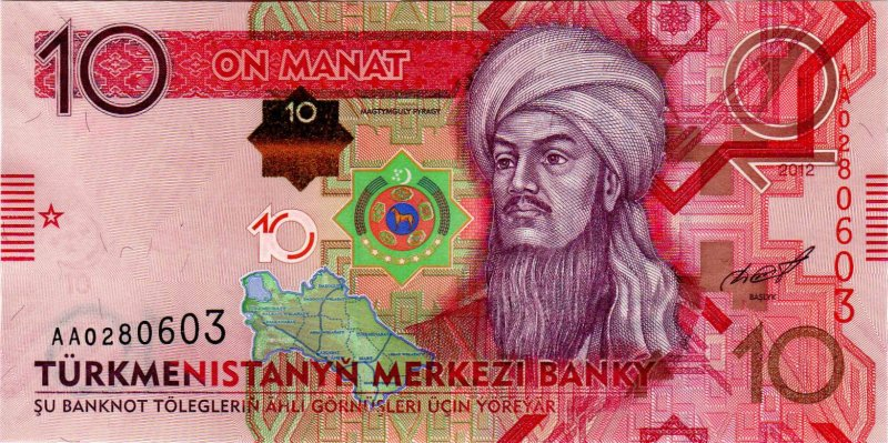 10 manat. Türkmenistan